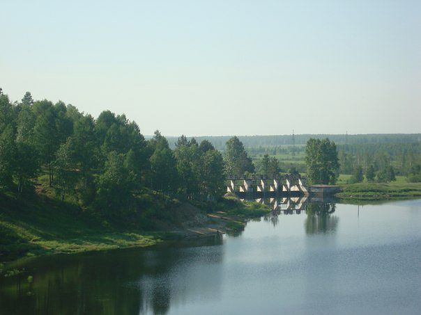 Магдагачинское водохранилище осенью